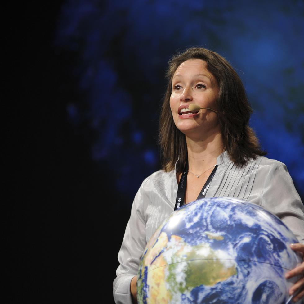 Carolina Ödman-Govender